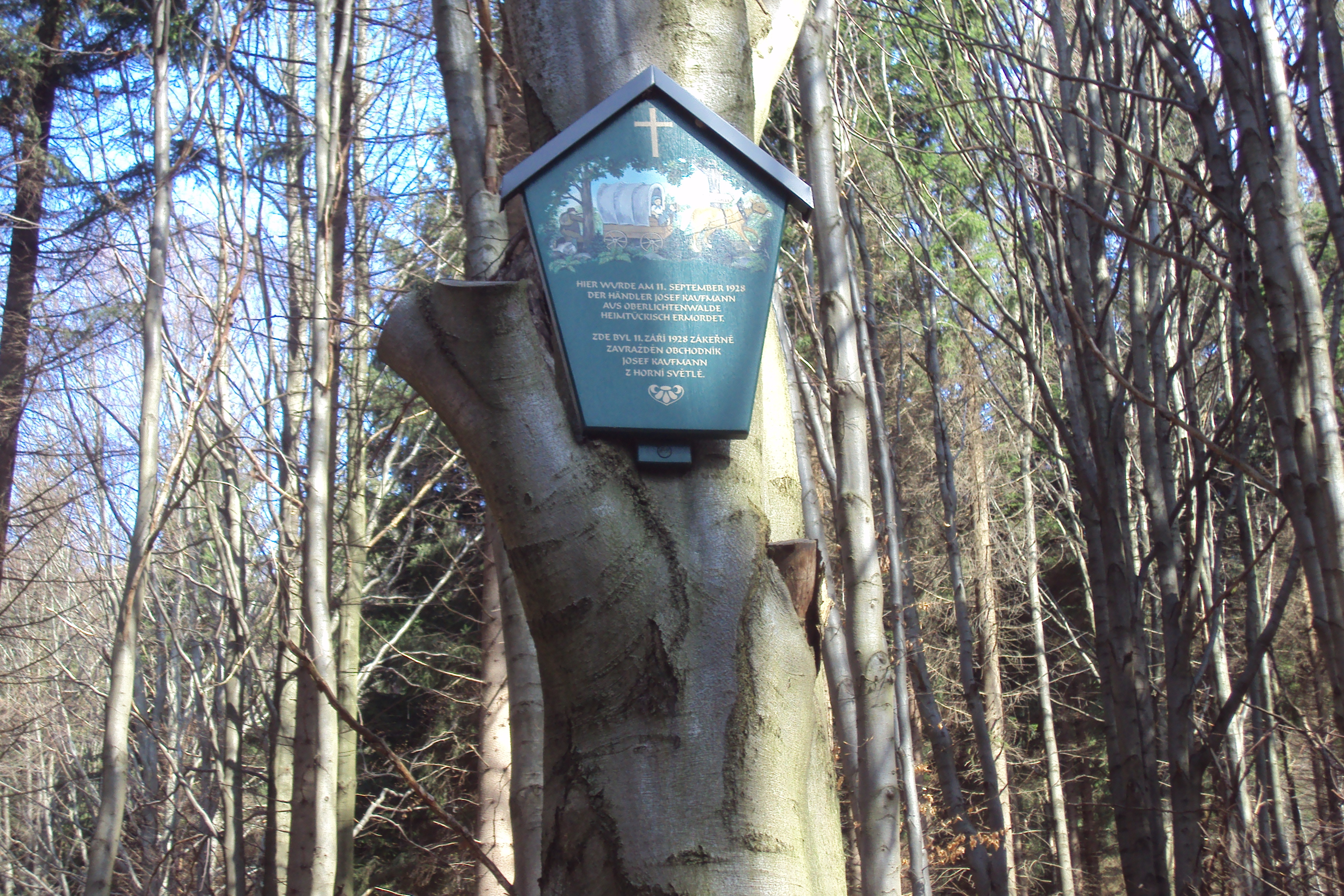 Cedule u místa, kde dříve stál Kaufmanův dub, u silničky mezi Novou Hutí a Horní Světlou v Lužických horách